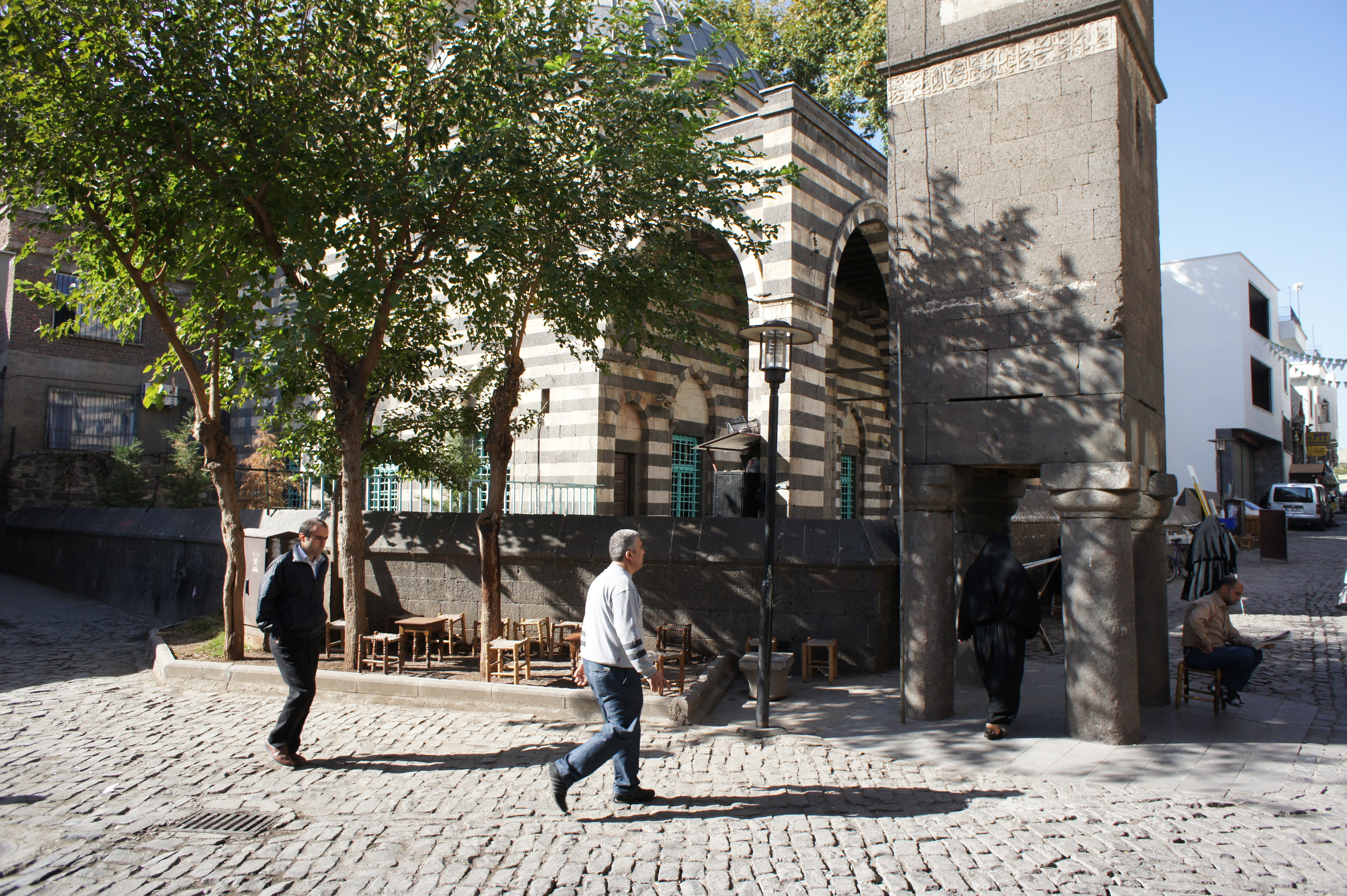 Kurdî: Çar lingên Minareya Çarling a Amedê.